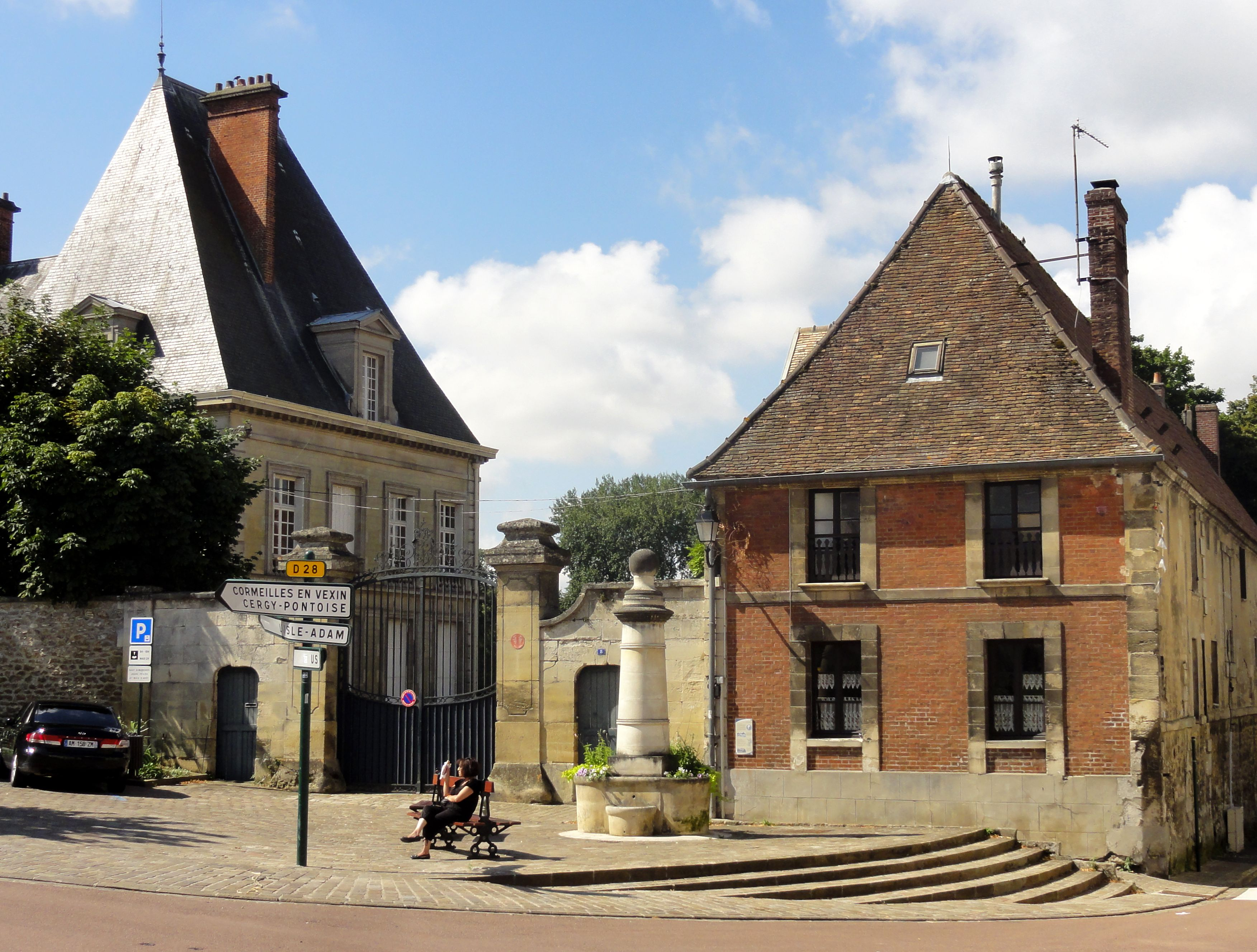 Place Amiral Ernest Peyron, avec l'entrée du château et une fontaine.